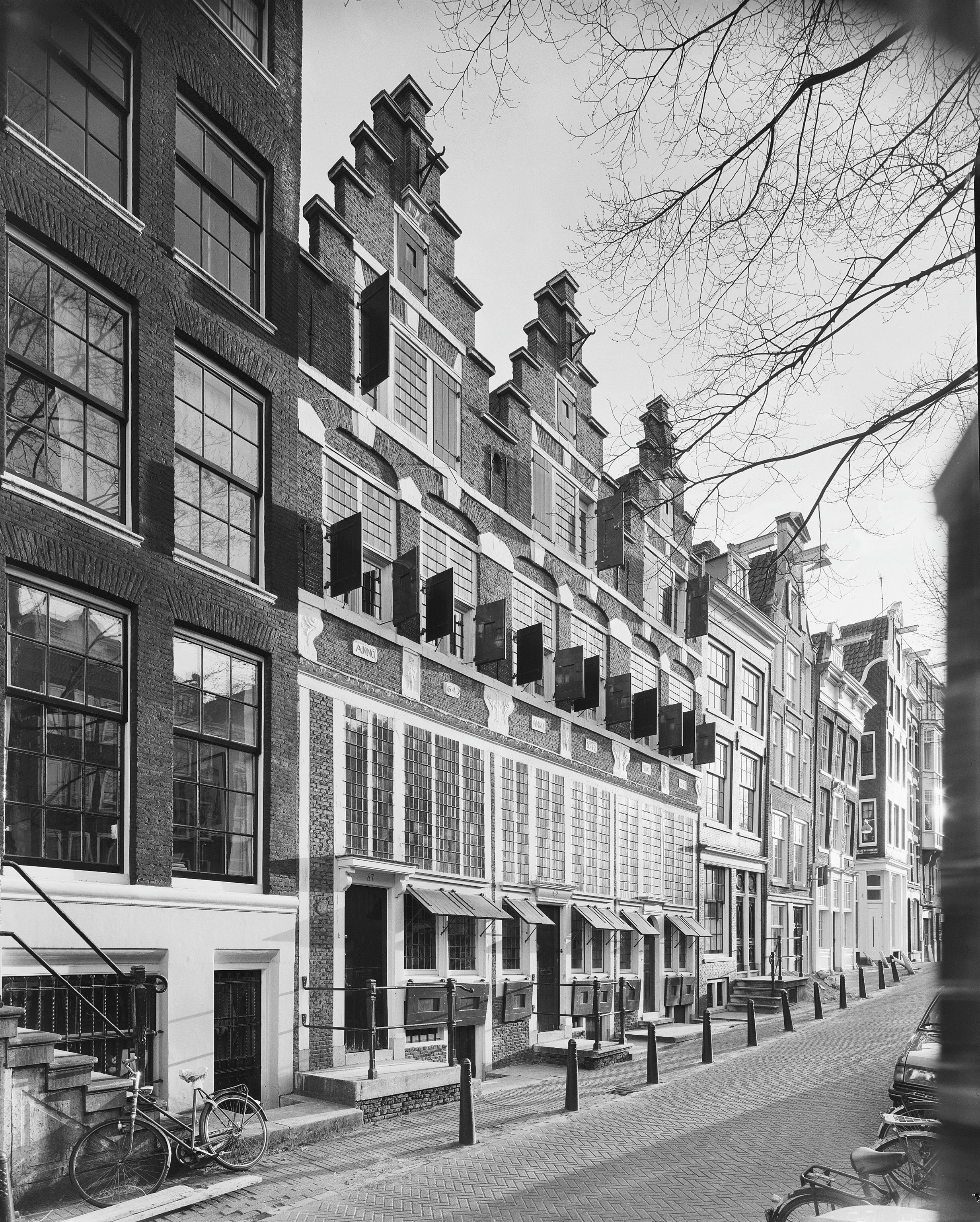 Exterieur VOORGEVELS, OVERZICHT